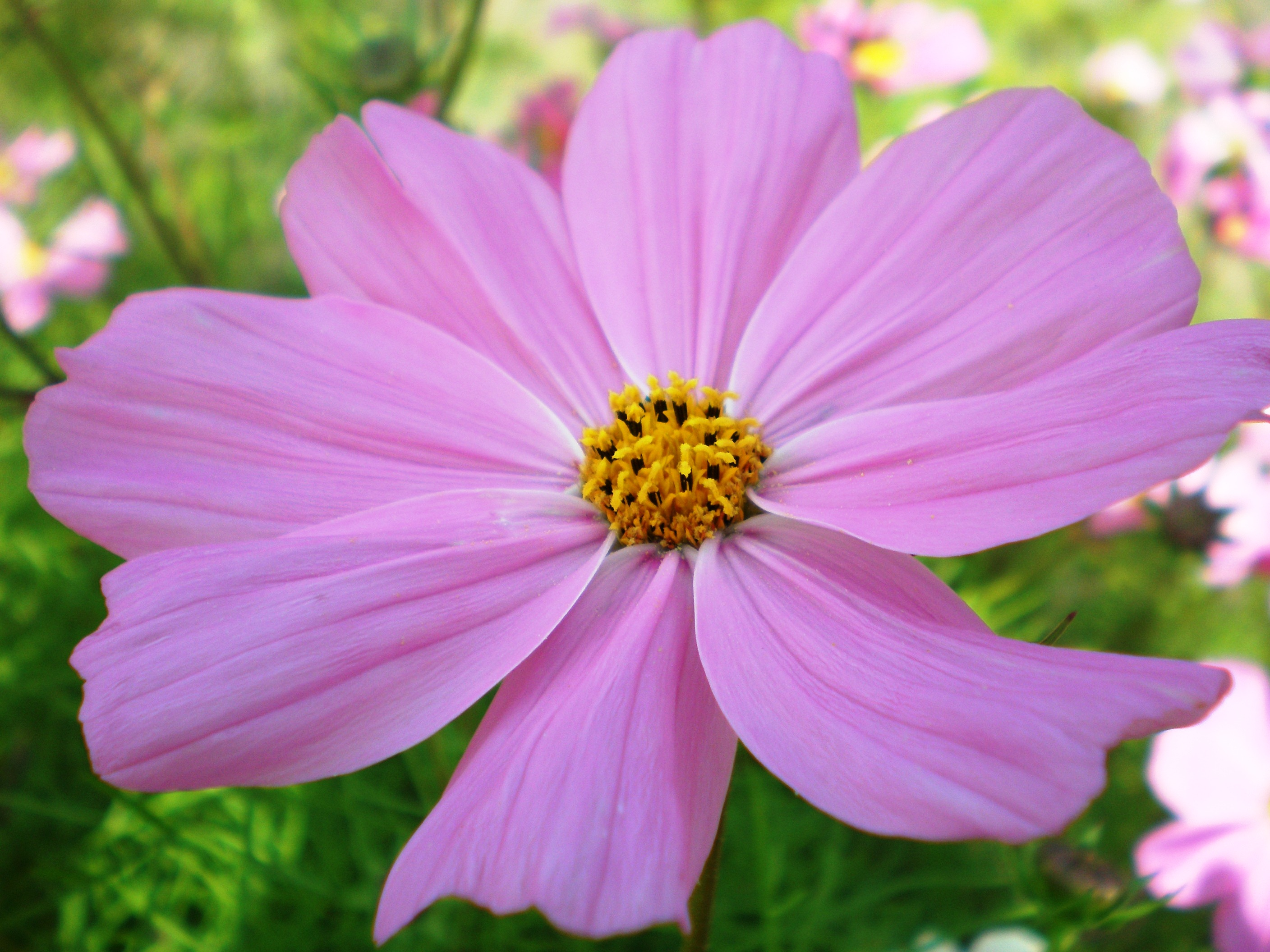 Cosmos bipinnatus